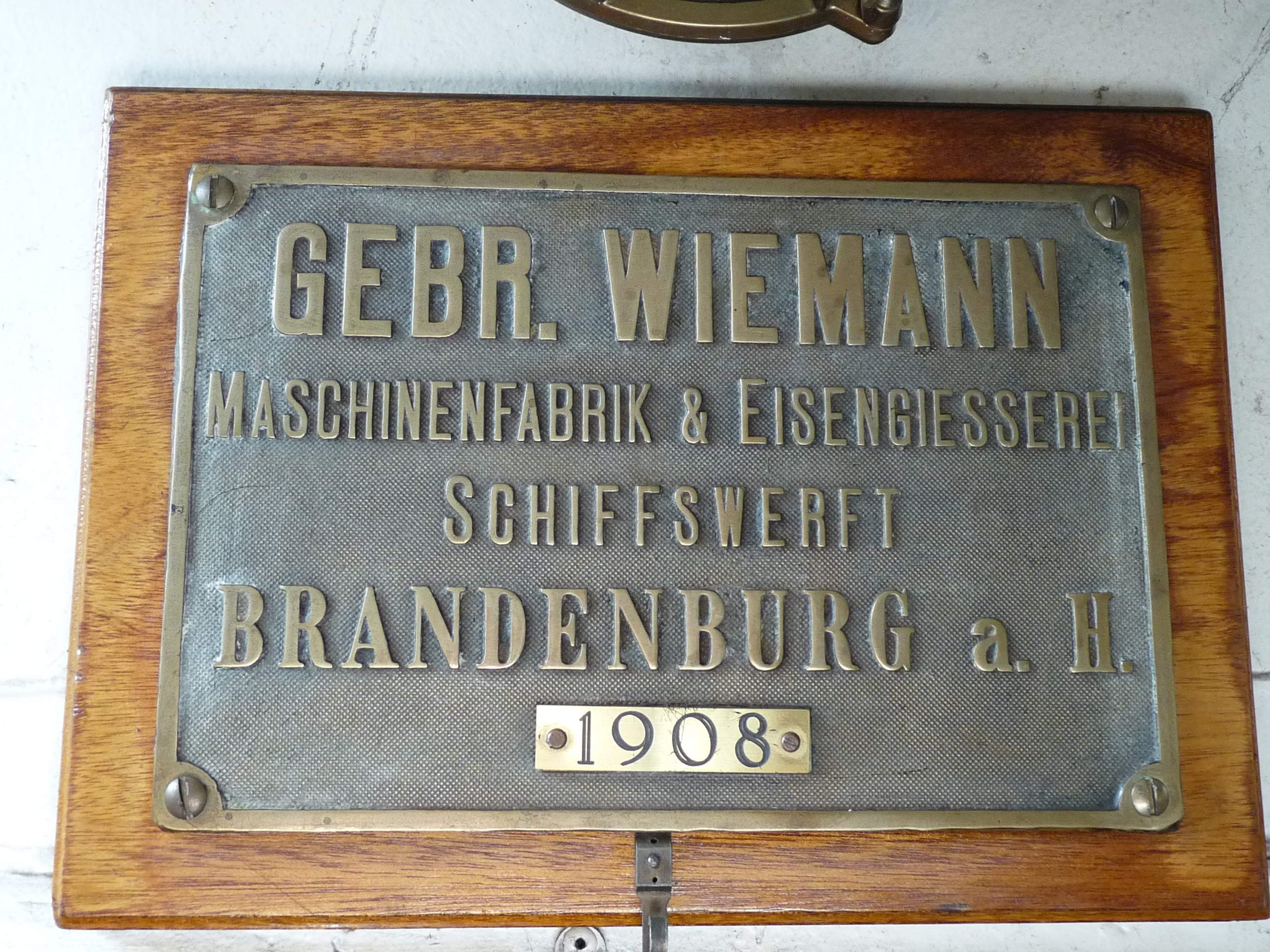 Firmenplakette an der Dampfmaschine des Dampfschiffes Gustav Weiße Flotte Potsdam